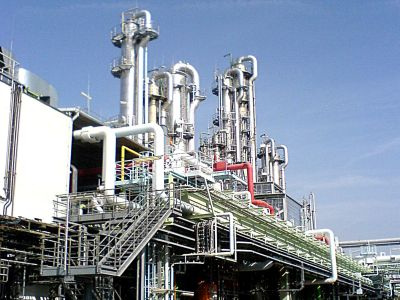 Polymer-Kolonne (Herstellung von Plastikgranulat) im Chemiewerk Ticona in Kelsterbach bei Frankfurt am Main. Selbst fotografiert am Samstag, 23. September 2006. ACHTUNG! Das Bild zeigt nicht die Polimerisation bei Ticona, sondern den "Monomerbetrieb", in dem Trioxan als Vorprodukt für die Polimerisation erzeugt und gereinigt wird.